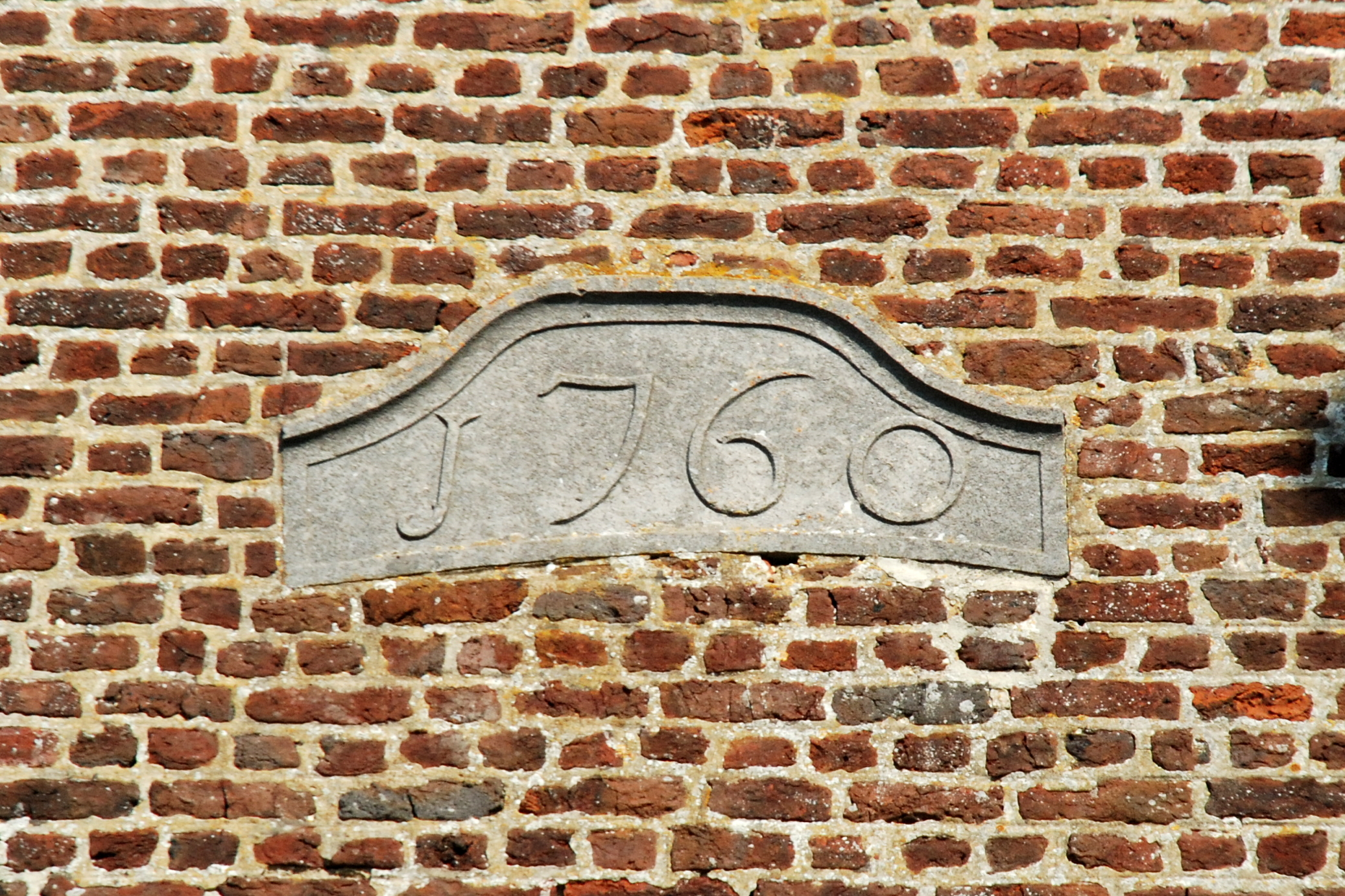 Belgique - Brabant wallon - Église Saint-Pierre de Glabais